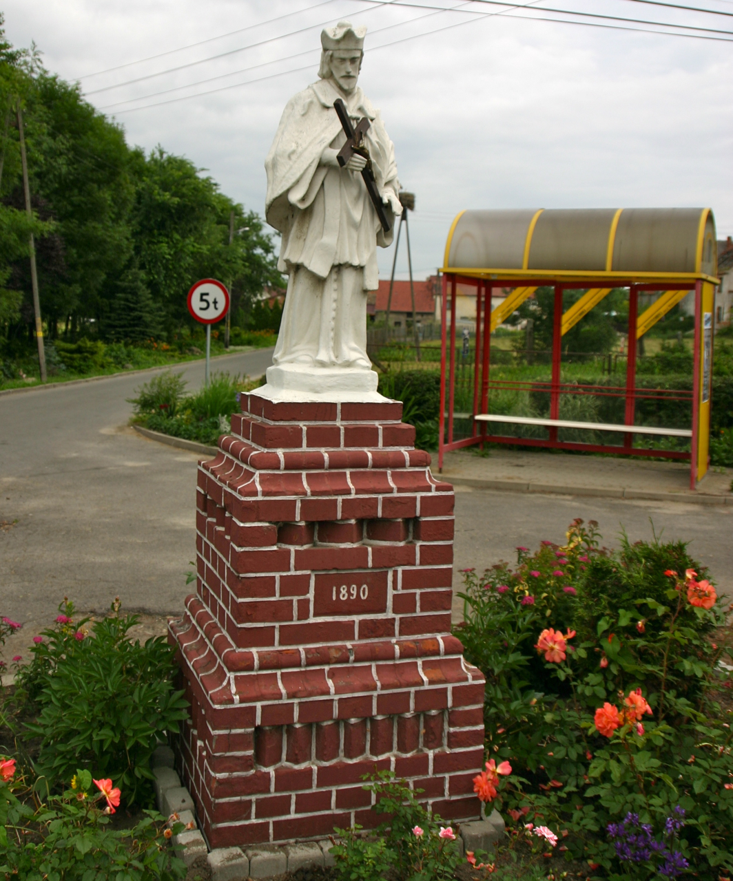 Ściborowice — wieś w Polsce położona w województwie opolskim, w powiecie krapkowickim, w gminie Krapkowice. Object location50° 25′ 17″ N, 17° 55′ 28″ E